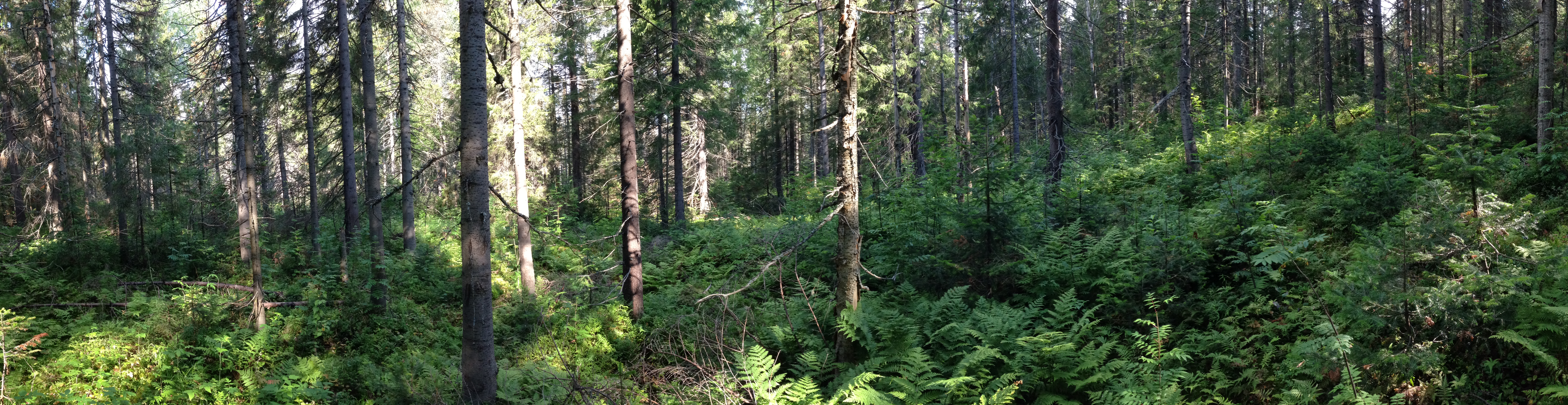 Таежный лес в Пермском крае